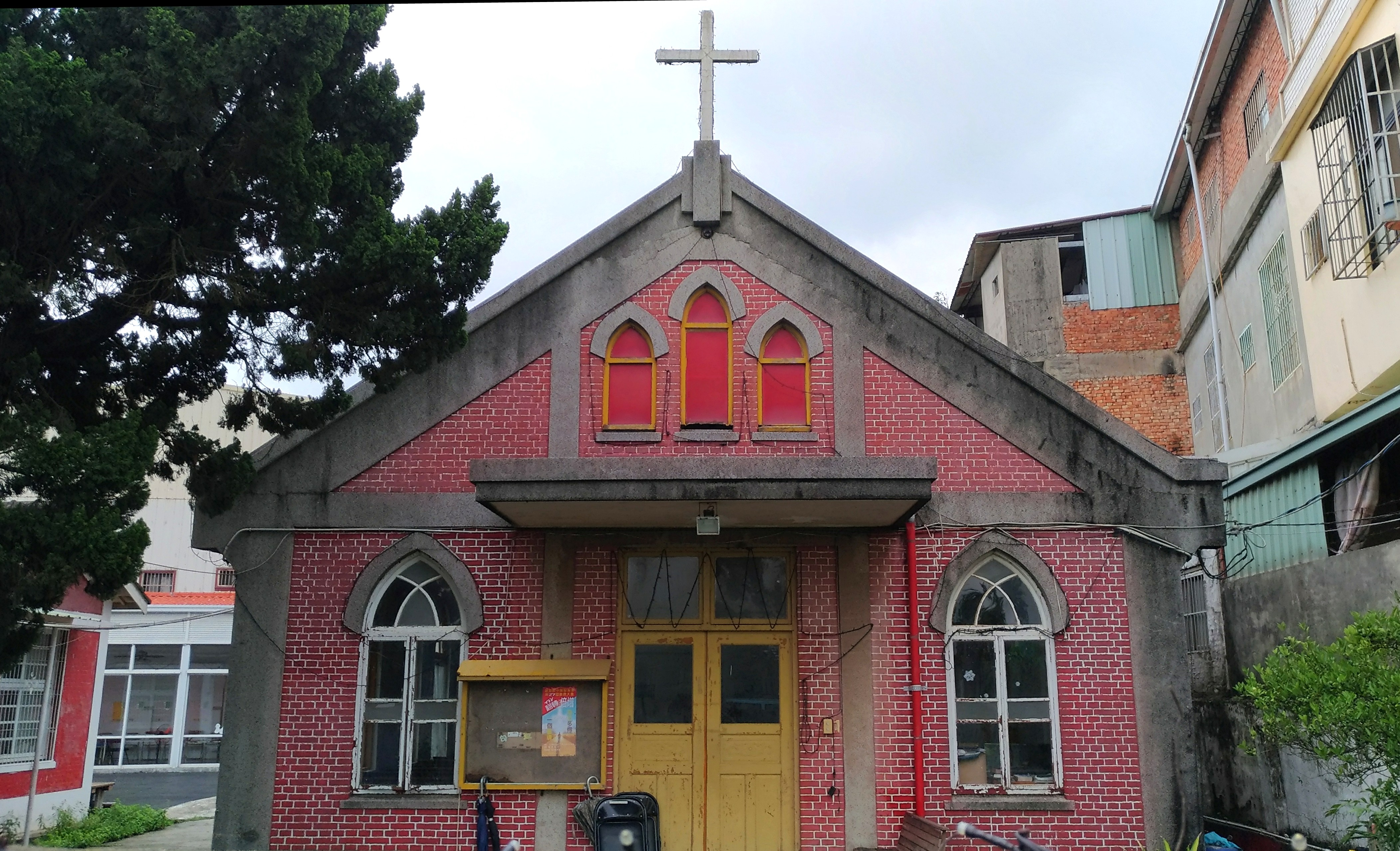 中文（台灣）: 清泉崗聖潔教會，即基督教中華聖潔會清泉崗教會，地址：臺中市大雅區仁愛路81號。